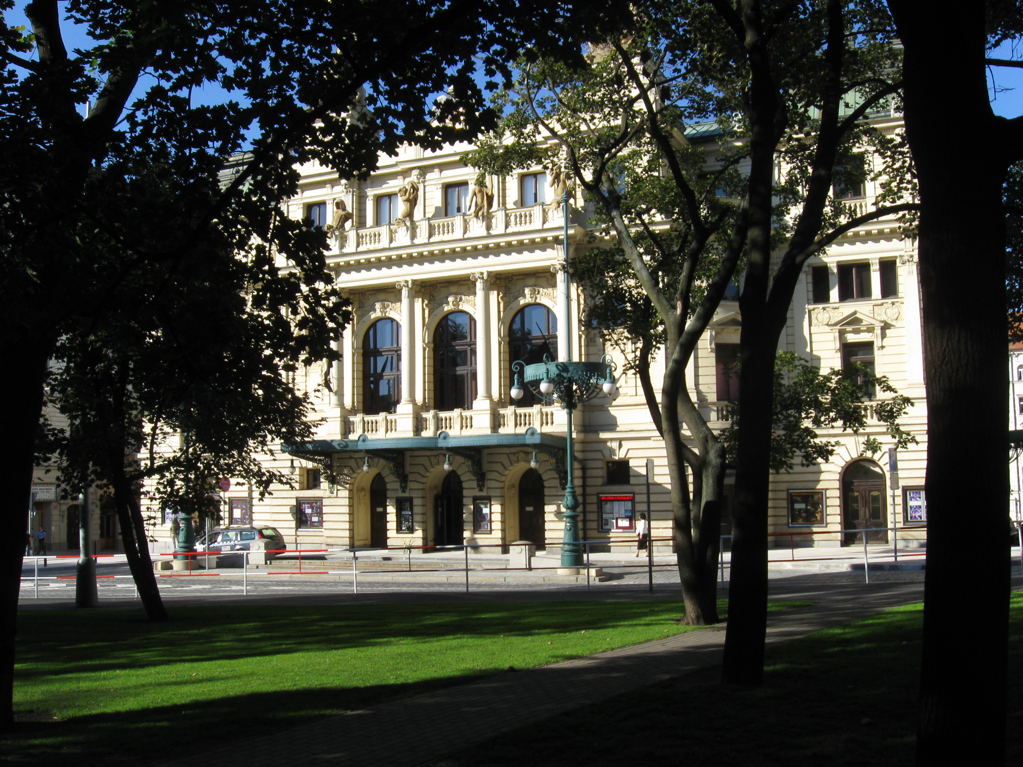 Divadlo na Vinohradech, Praha 2-Vinohrady, nám. Míru 1450/7